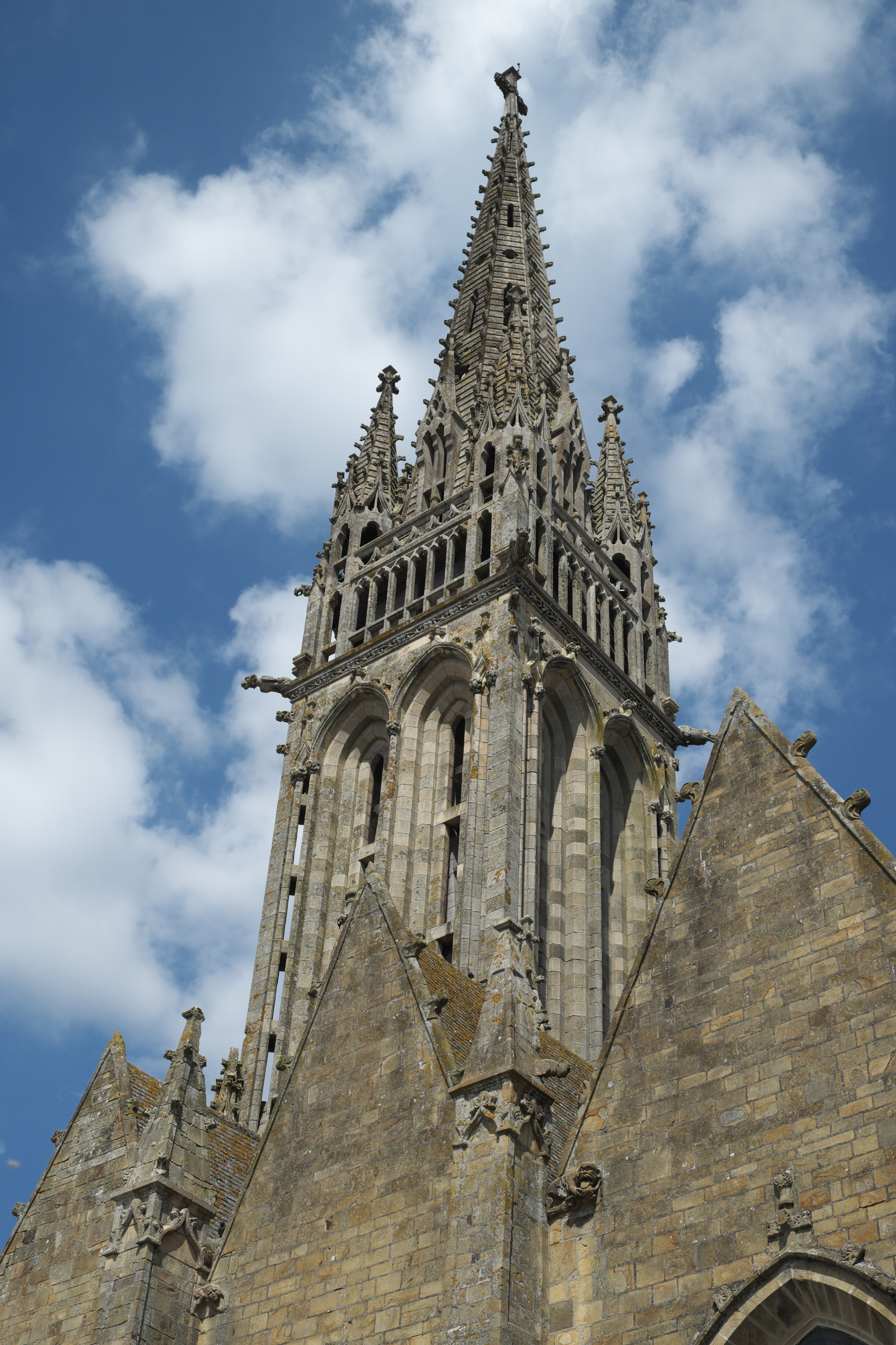 Basilika Notre-Dame-de-l'Assomption in La Guerche-de-Bretagne im Département Ille-et-Vilaine (Bretagne/Frankreich)